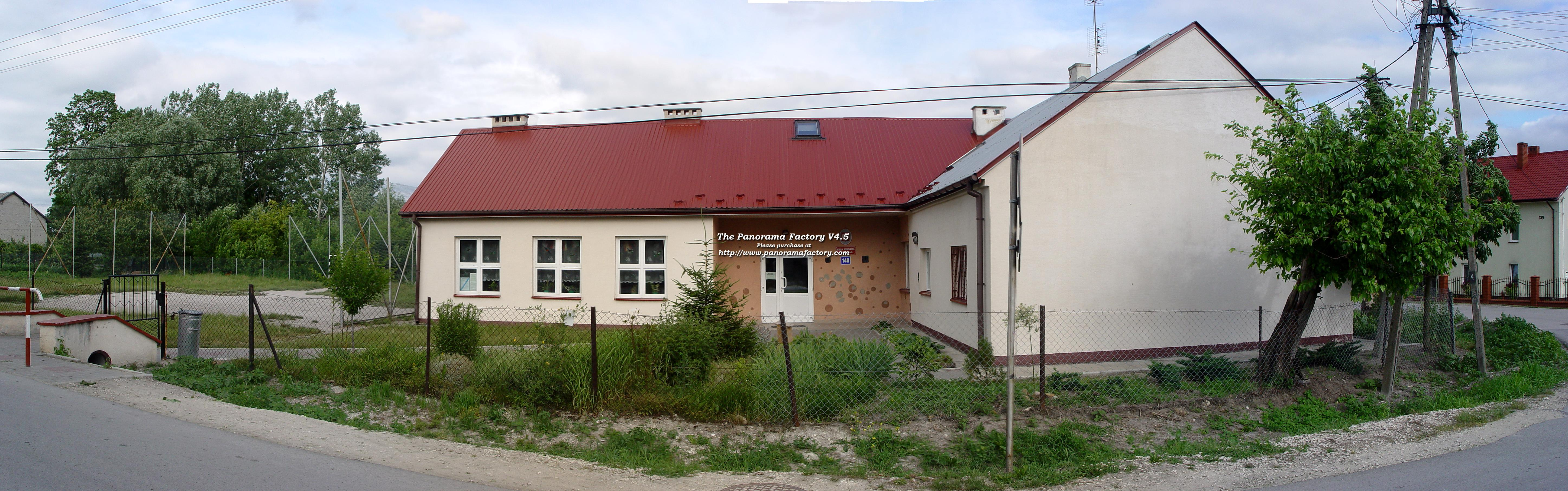 Szkoła Podstawowa w Siesławicach k.Buska, panorama